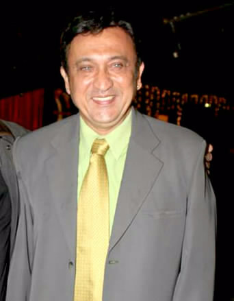 Tej Sapru at Jaya Prada launches Me Home TV